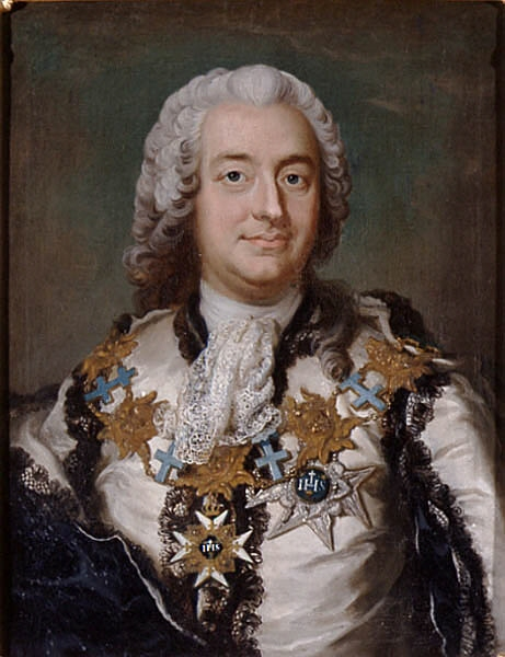 Anders Johan von Höpken, svensk, (1712-1789)